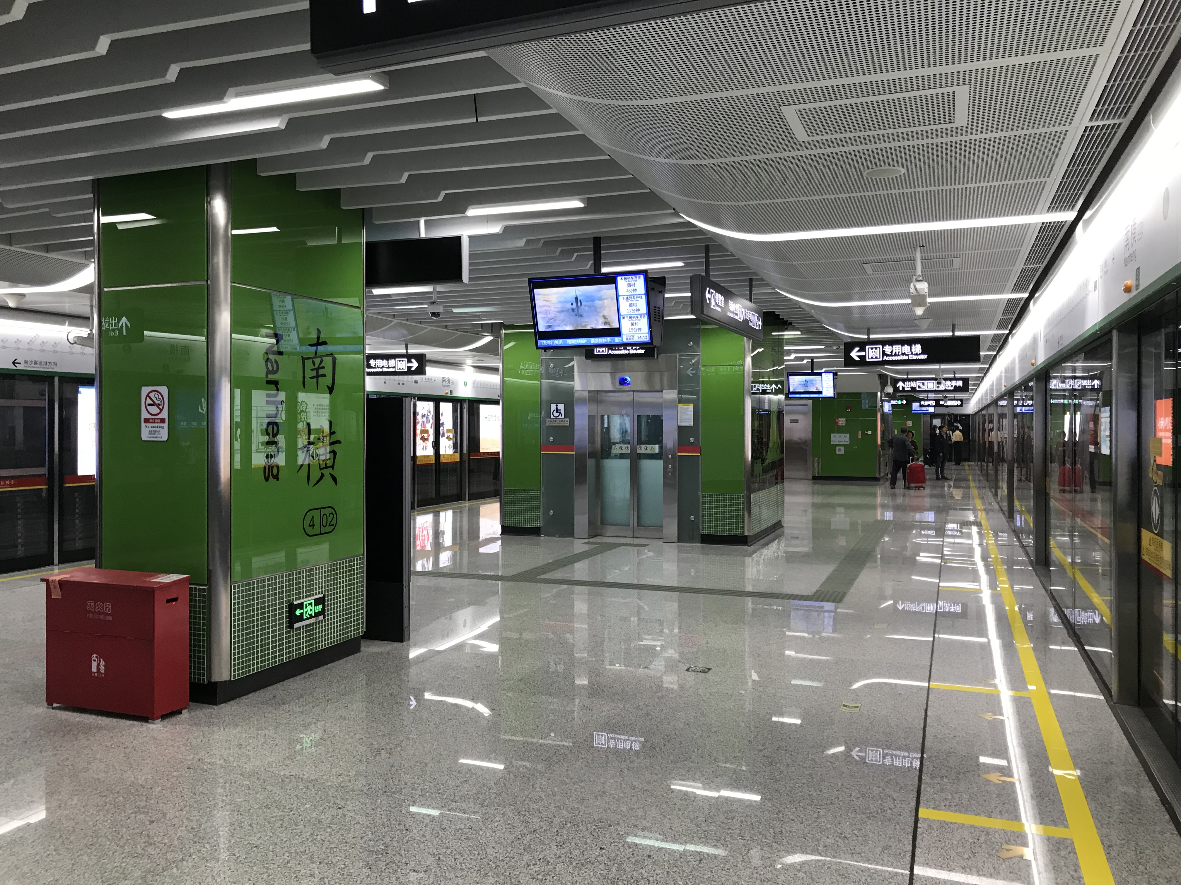 广州地铁南横站